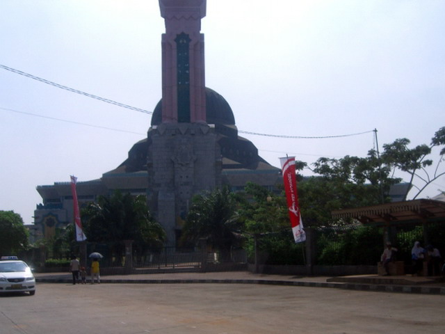 saya sebagai pembuat gambar ini menyatakan gambar ini mempunyai lisensi Domain Umum. Bkusmono 08:56, 5 Juli 2007 (UTC)